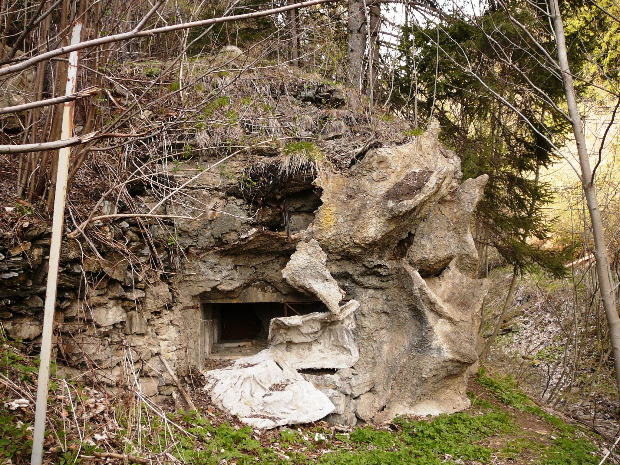 Opera 4, sbarramento tenne